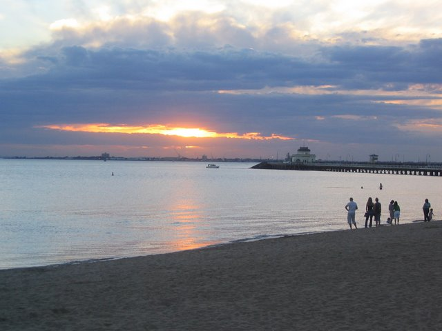 St.Kilda Beach al tramonto